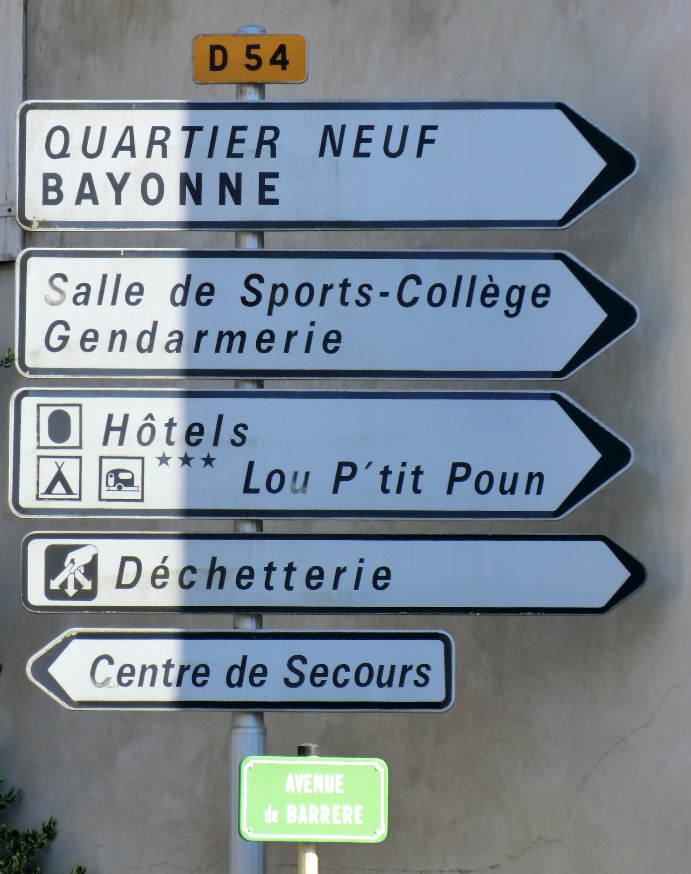 Panneau indicateur du Vieux-Bourg de Saint-Martin-de-Seignnanx.